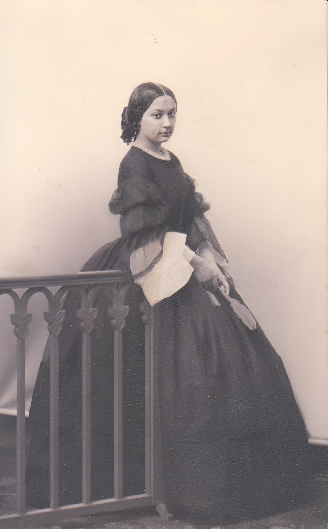 Мария Ивановна Шебеко, ур. Гончарова (1839—1935)